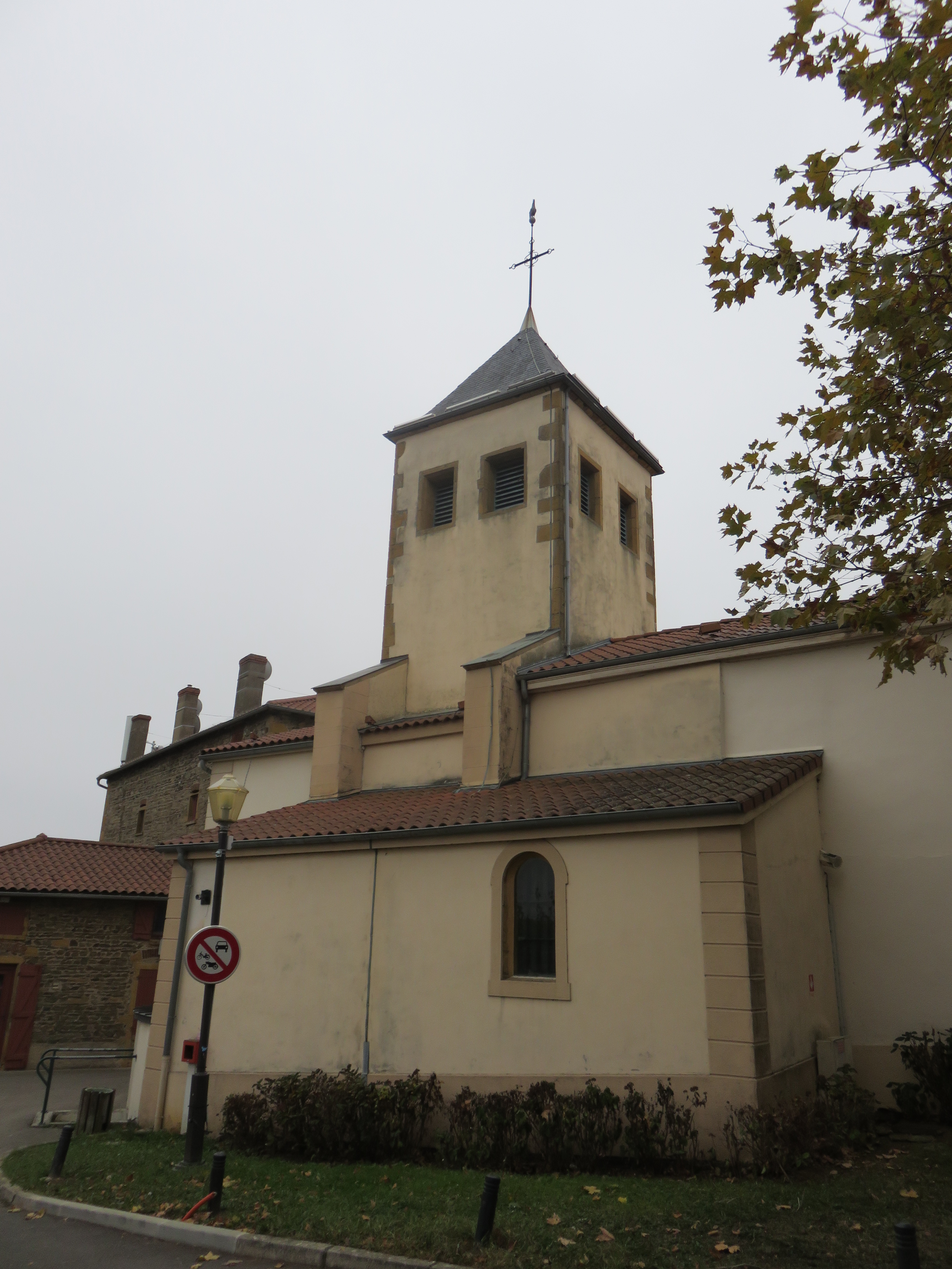 Église Saint-Barthélémy de Fleurieux-sur-l'Arbresle (Rhône, France).